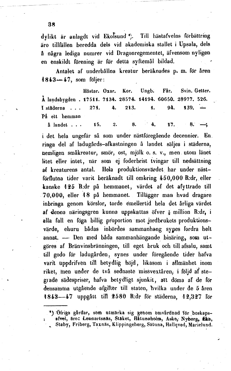 utdrag ur beskrivning av Uppsala län 1850, bakgrundmaterial från Projekt Runeberg